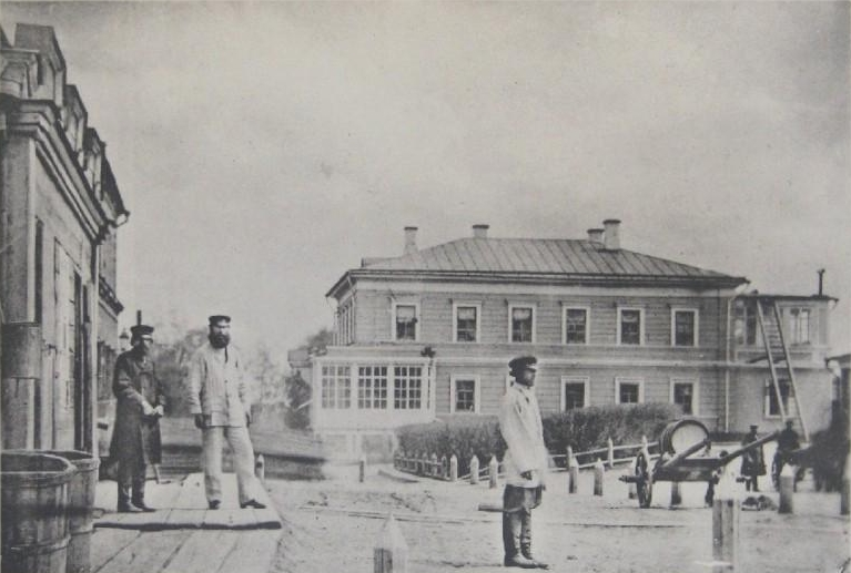 Хозяйский дом на Казанском стеариновом заводе Фабрично-торгового товарищества братьев Крестовниковых. В нём жили братья Крестовниковы, а также размещалась заводская контора.